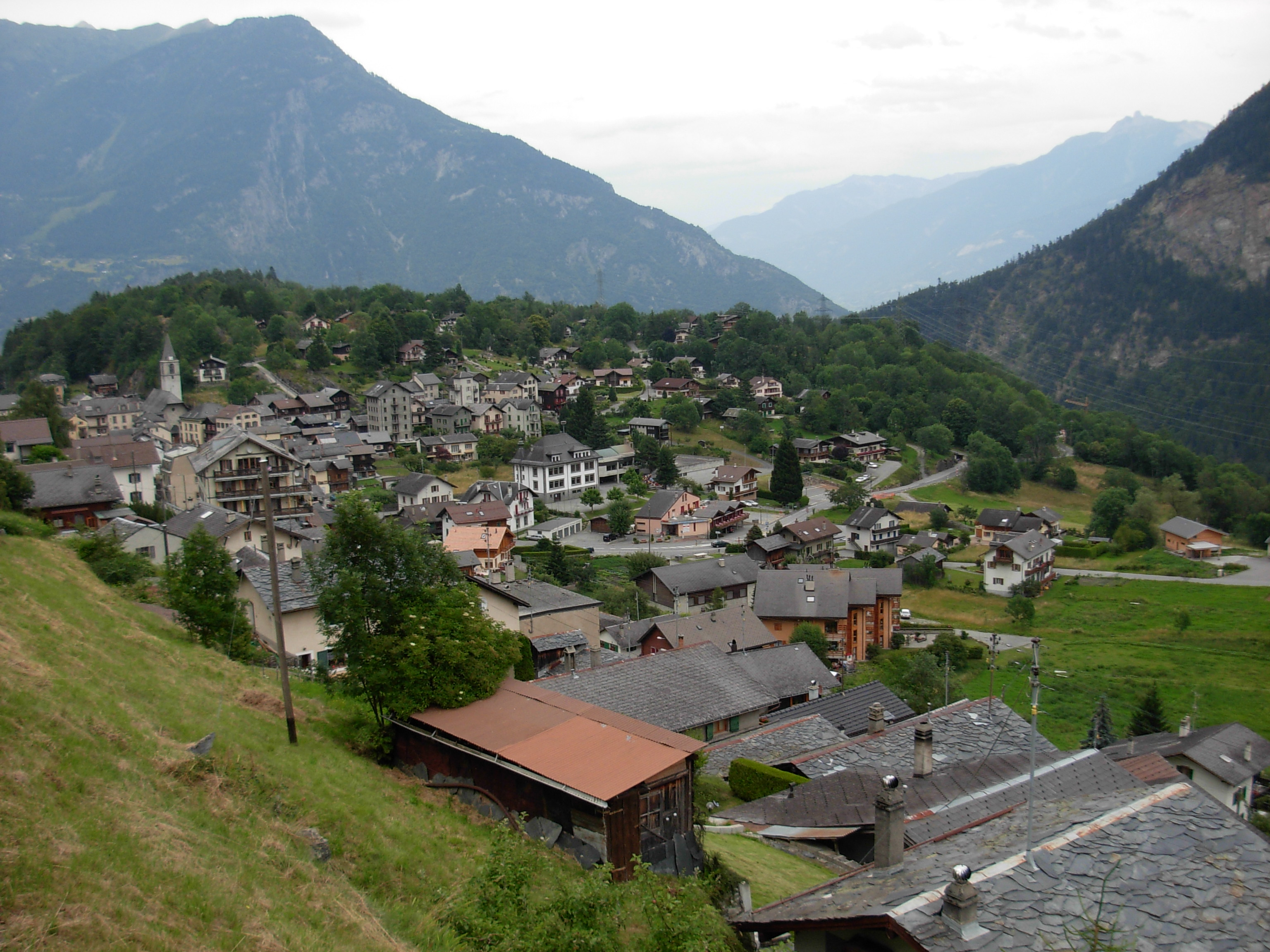 Le village de Salvan, vu depuis le train TMB. Juillet 2007.